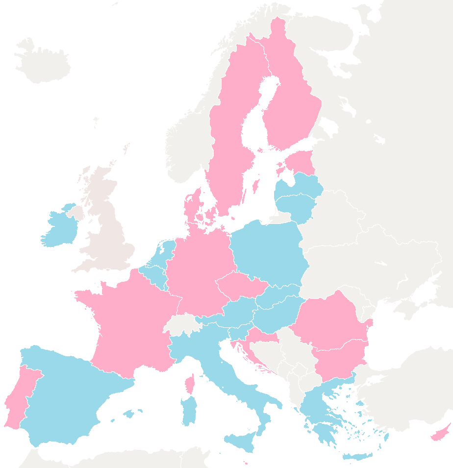 Sestava Komisije Ursule von der Leyen glede na spol